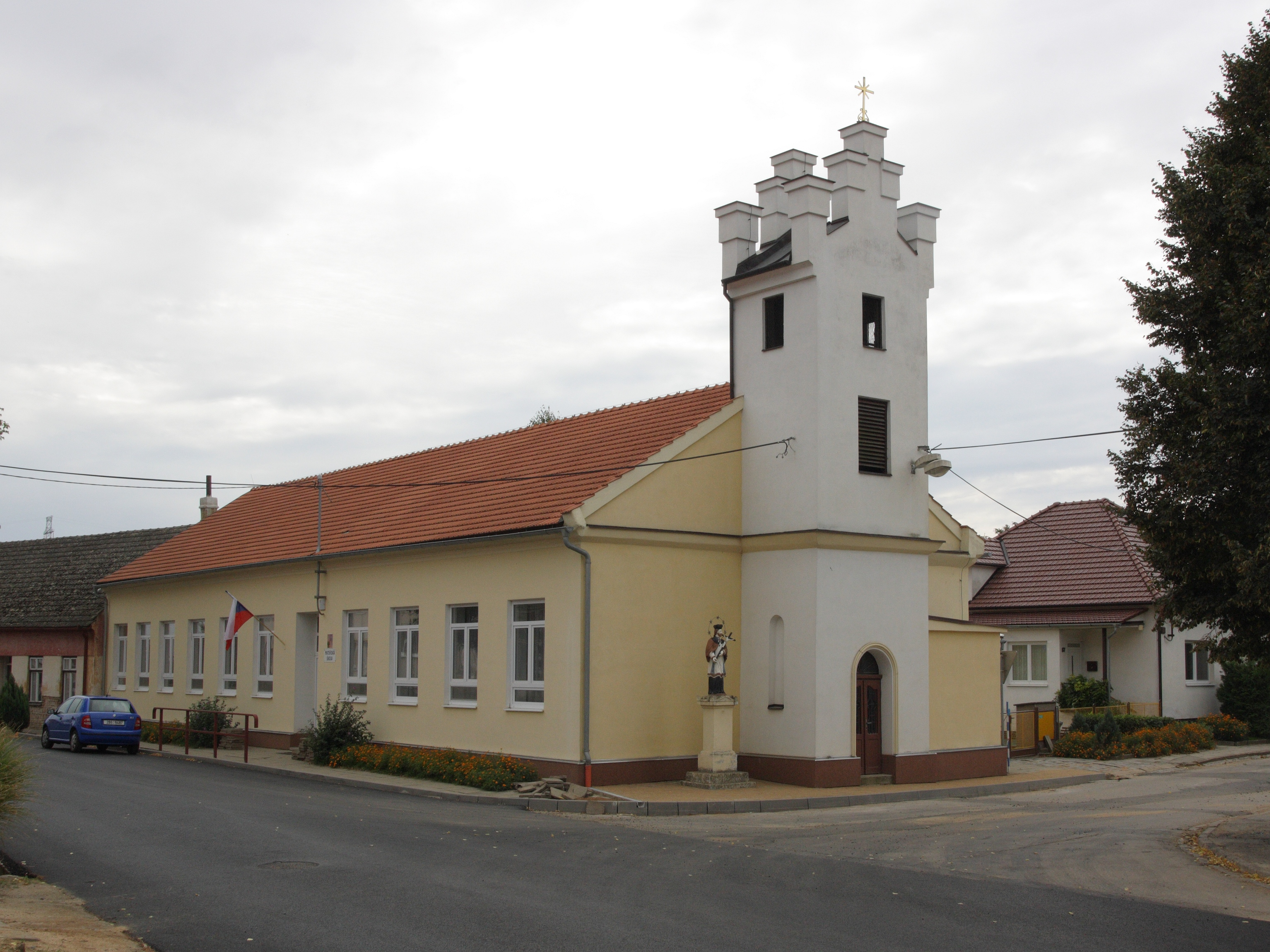 Trboušany - zvonice a mateřská škola.